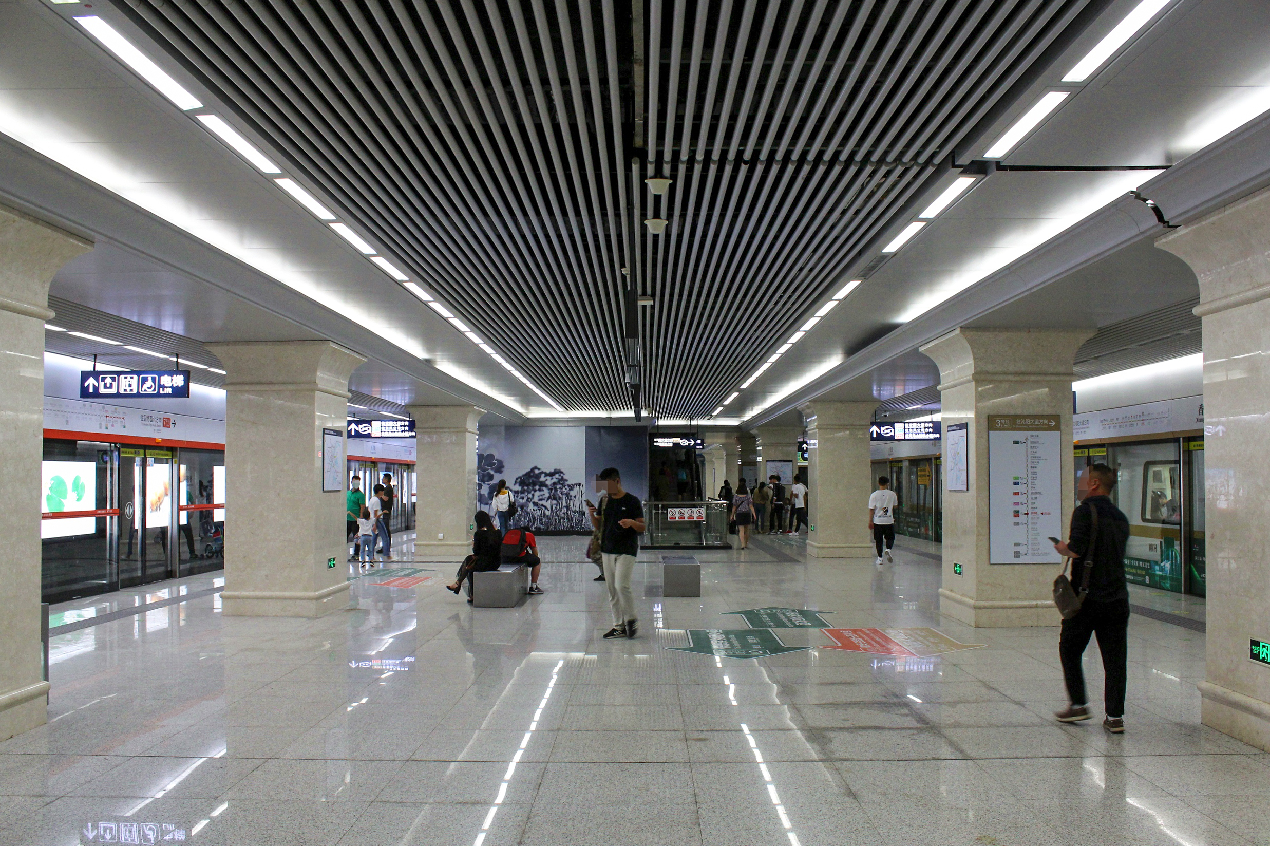 中文（中国大陆）: 武汉地铁香港路站站台，左侧为7号线，右侧为3号线。